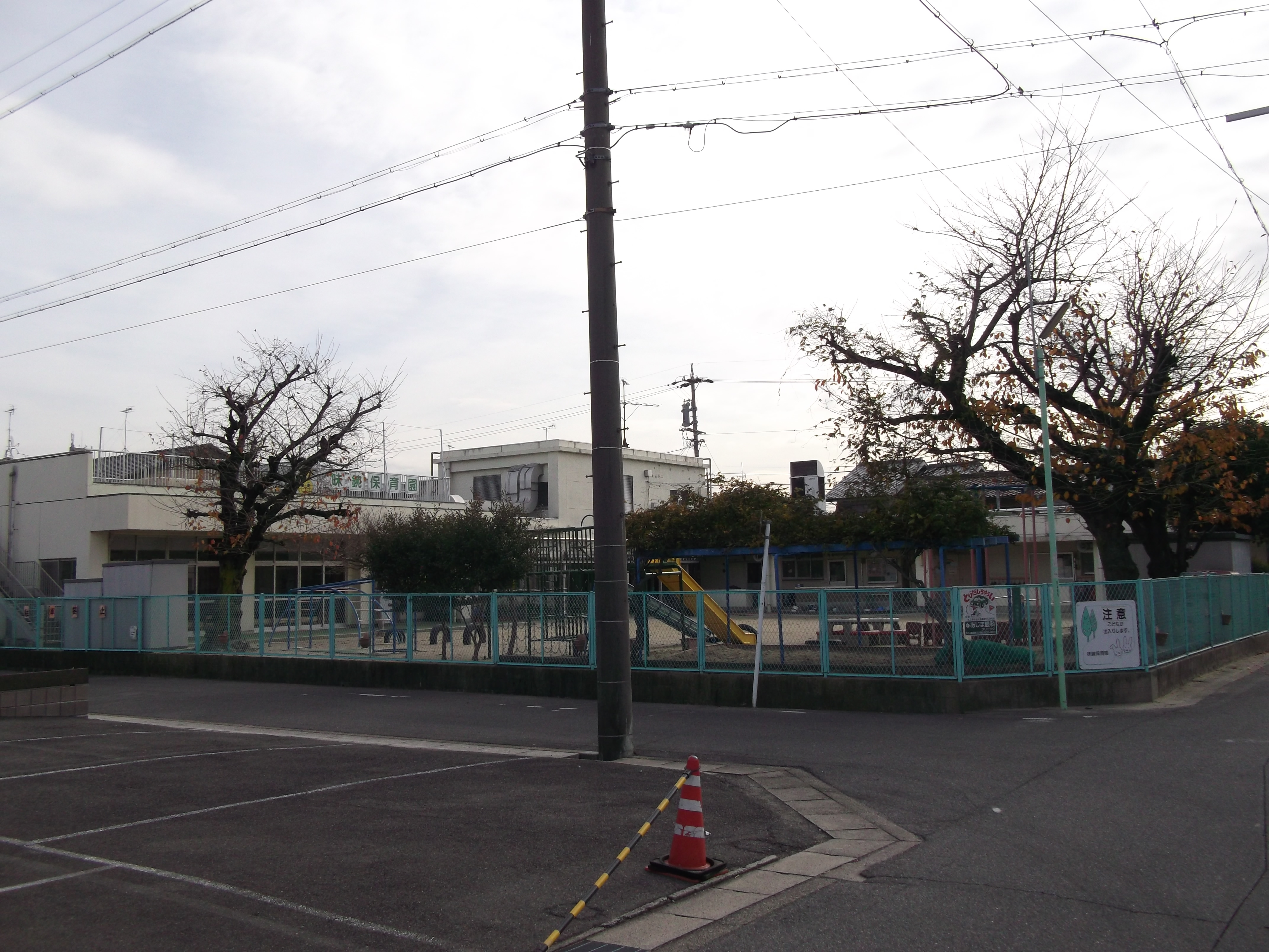 名古屋市北区楠味鋺五丁目に所在する名古屋市味鋺保育園を北西角から写す